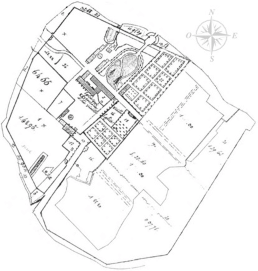 Plan cadastral de 1818 montrant les ruines de l'abbaye de l'Aumône, dans le Loir-et-Cher